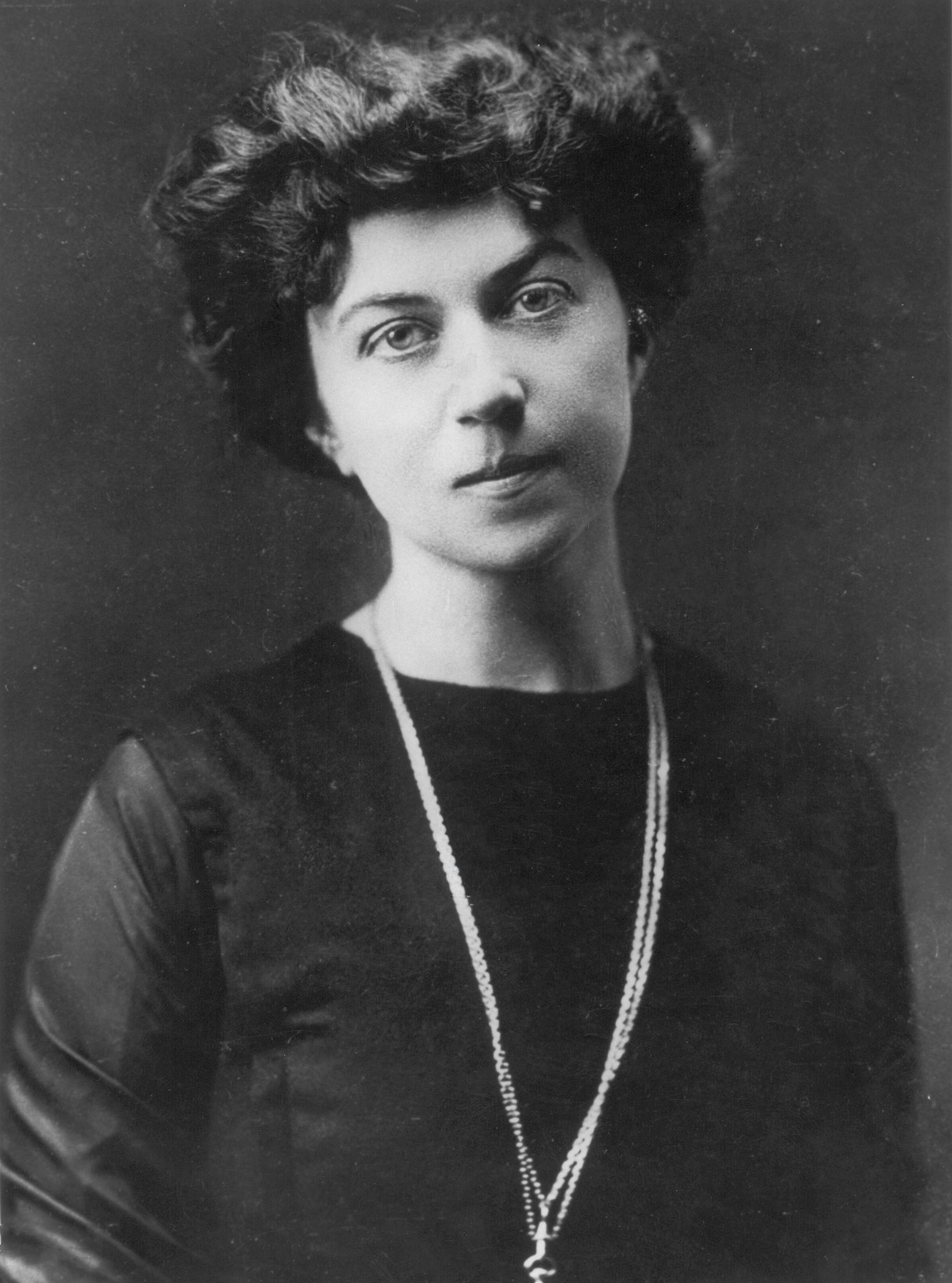 Aleksandra Kollontai